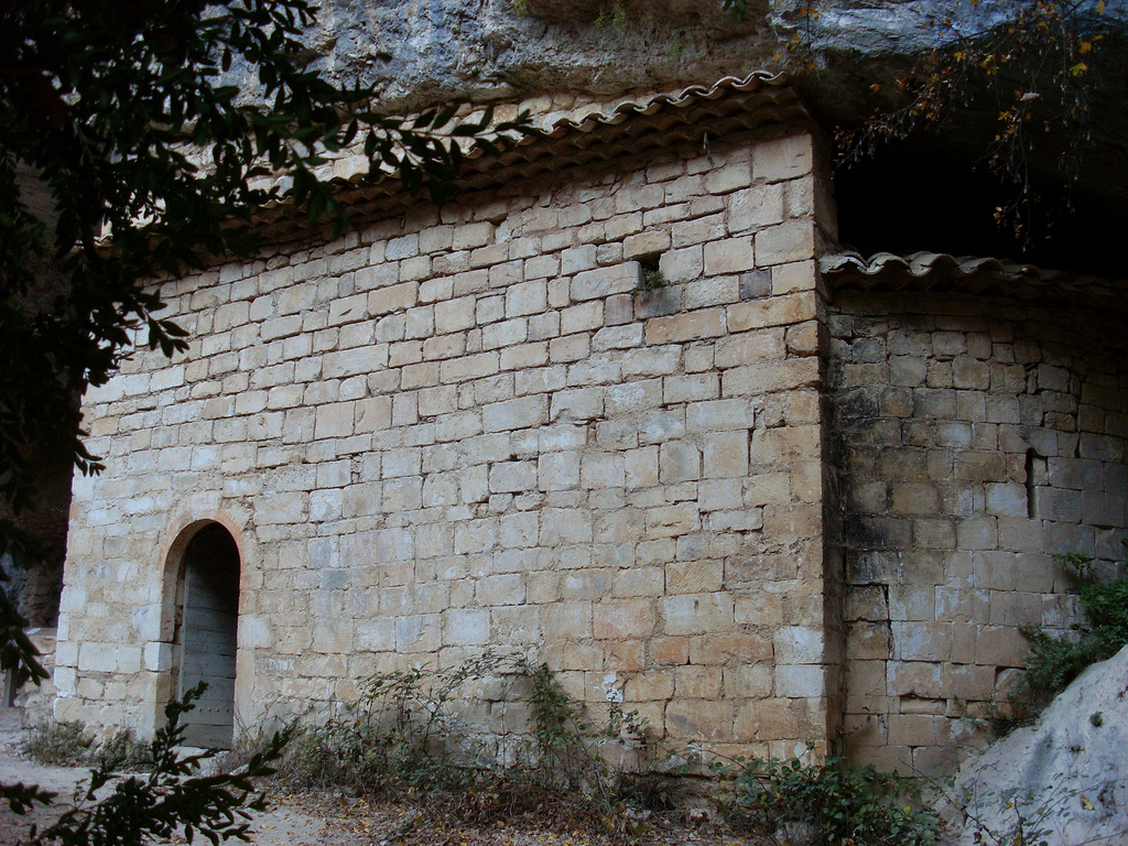 Chapelle troglodytique Saint-Michel Gorges de la Nesque